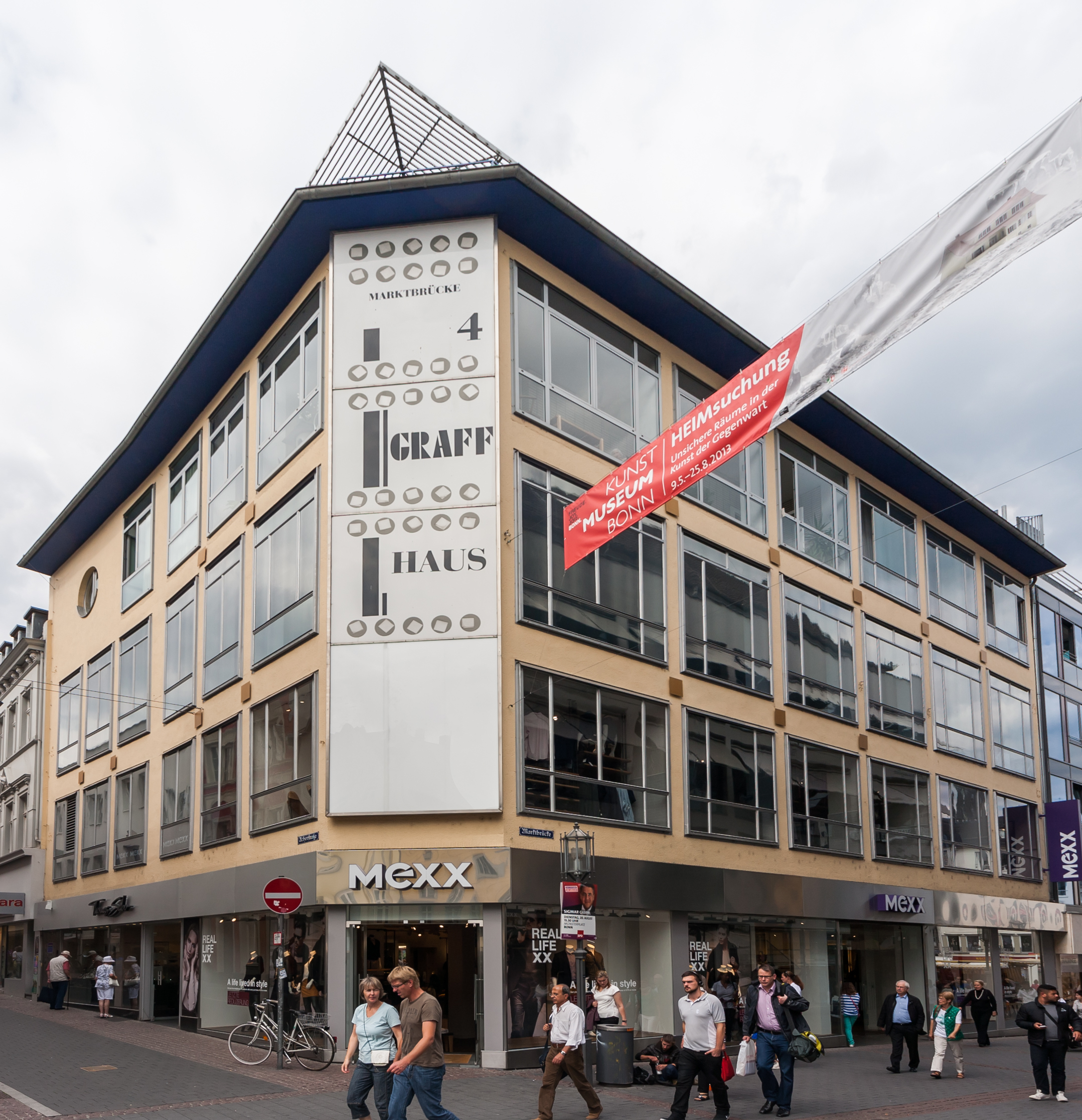 Graff-Haus, Marktbrücke 4/Acherstraße, Bonn: Ansicht aus Süden